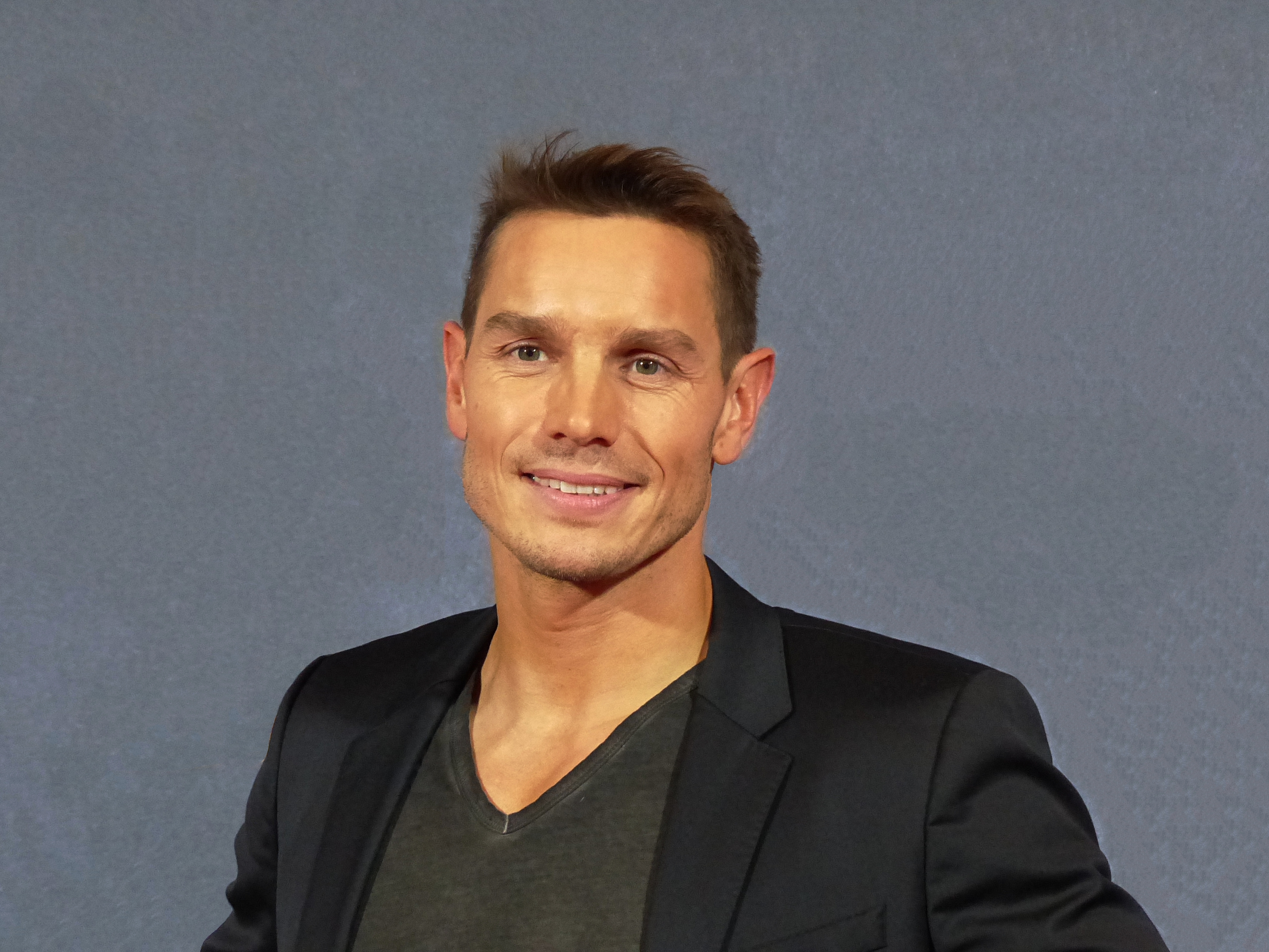 Dr. Daniel Gärtner beim VOX "Ewige Helden" Pressetermin, im Dezember 2015. Cropped Version of File:Dr. Daniel Gärtner (3).JPG without dominating add's